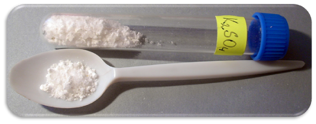 Síran draselný - K2SO4